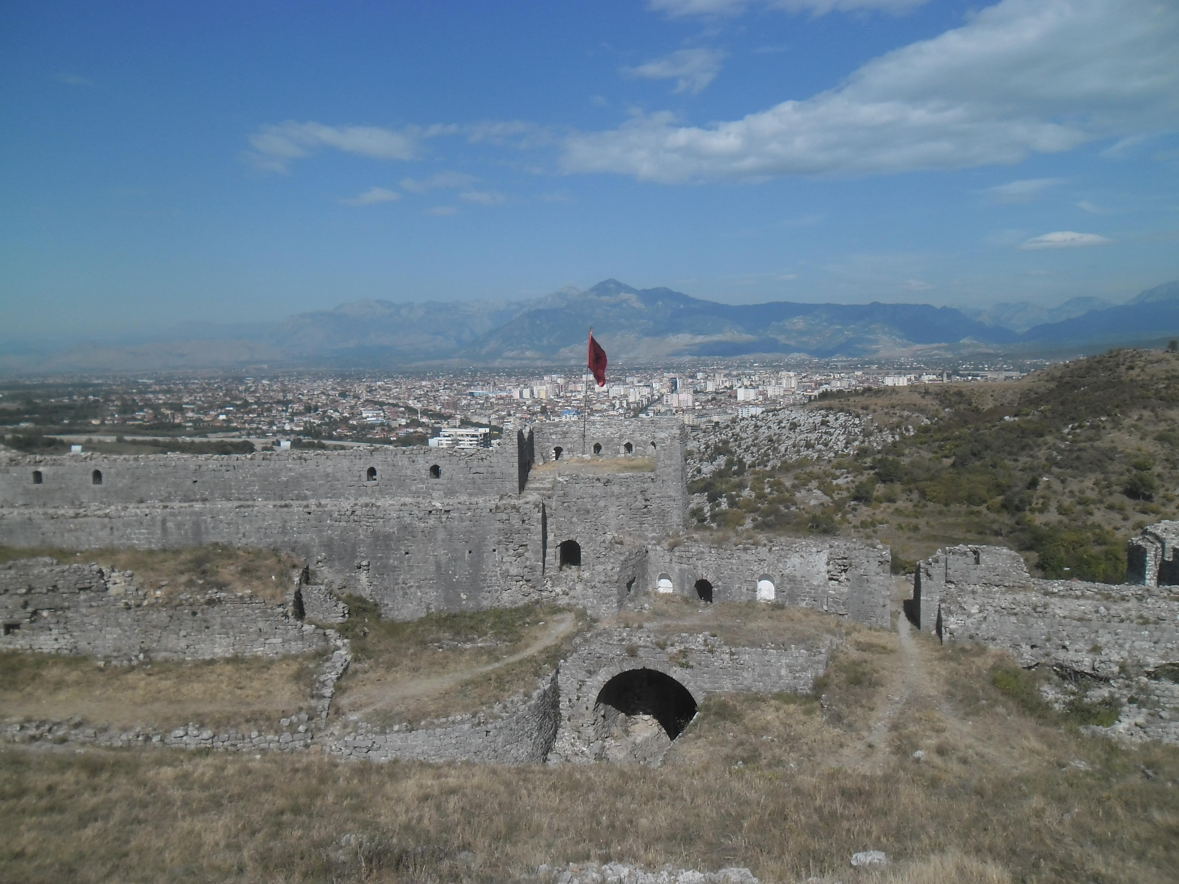 Shkodër